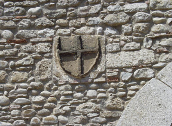 Stemma lapideo dei Cavalieri Teutonici posto sulla facciata esterna del complesso. Torre Alemanna a Cerignola (FG)